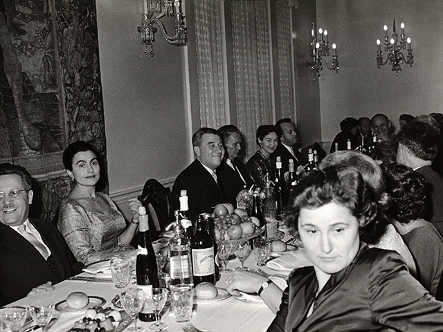 Srpski (latinica): Proslava pedesetog rođendana Aleksandra Rankovića u Belom dvoru, Beograd, 27.11.1959. Inventarski broj:1960_134_163